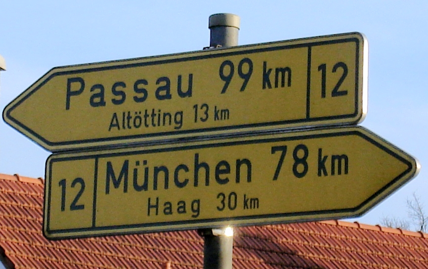 Straßenschild an der B12 vor der Innbrücke